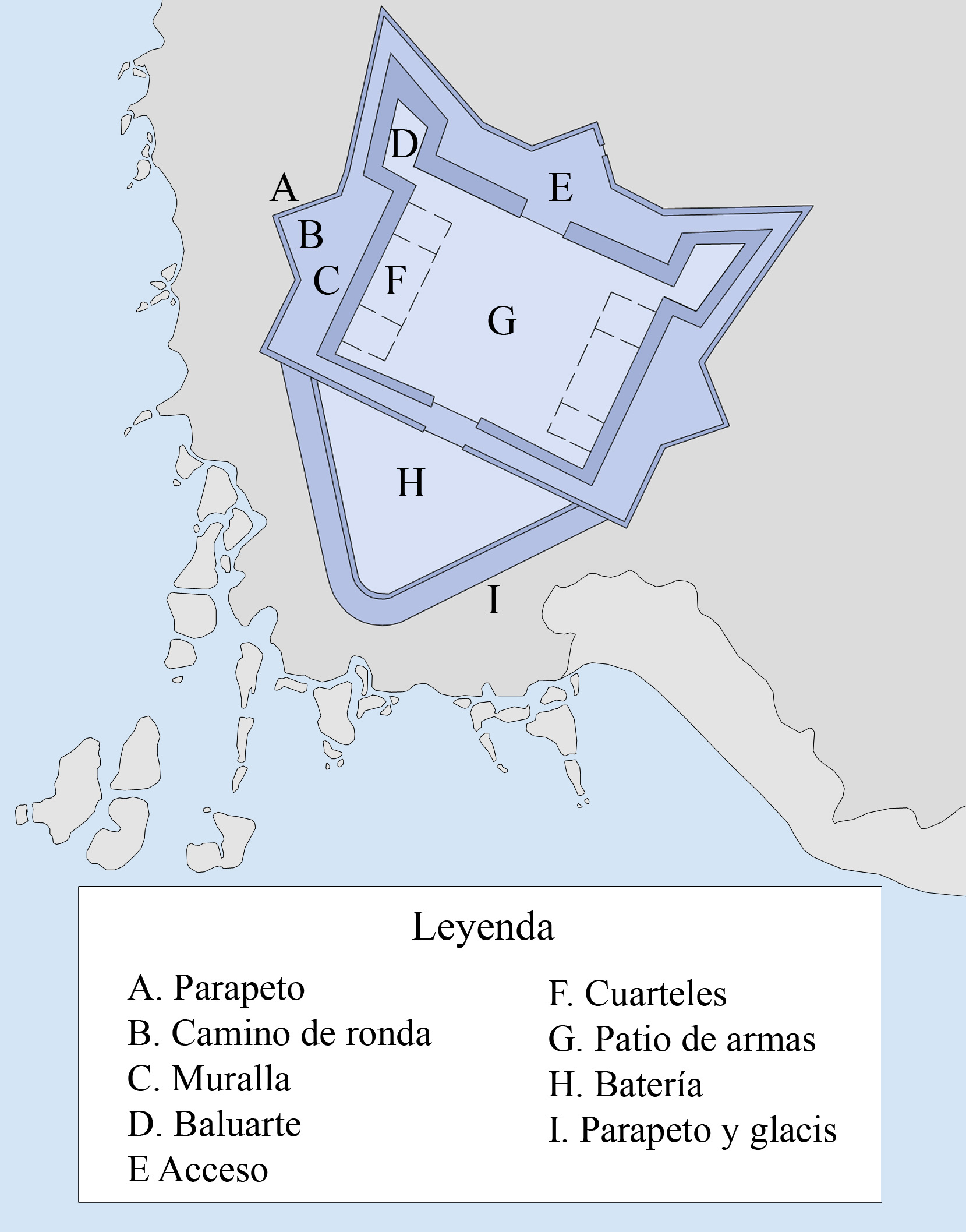 plano del Fuerte de Punta Mala de San Roque. Imagen realizada para Wikimedia.